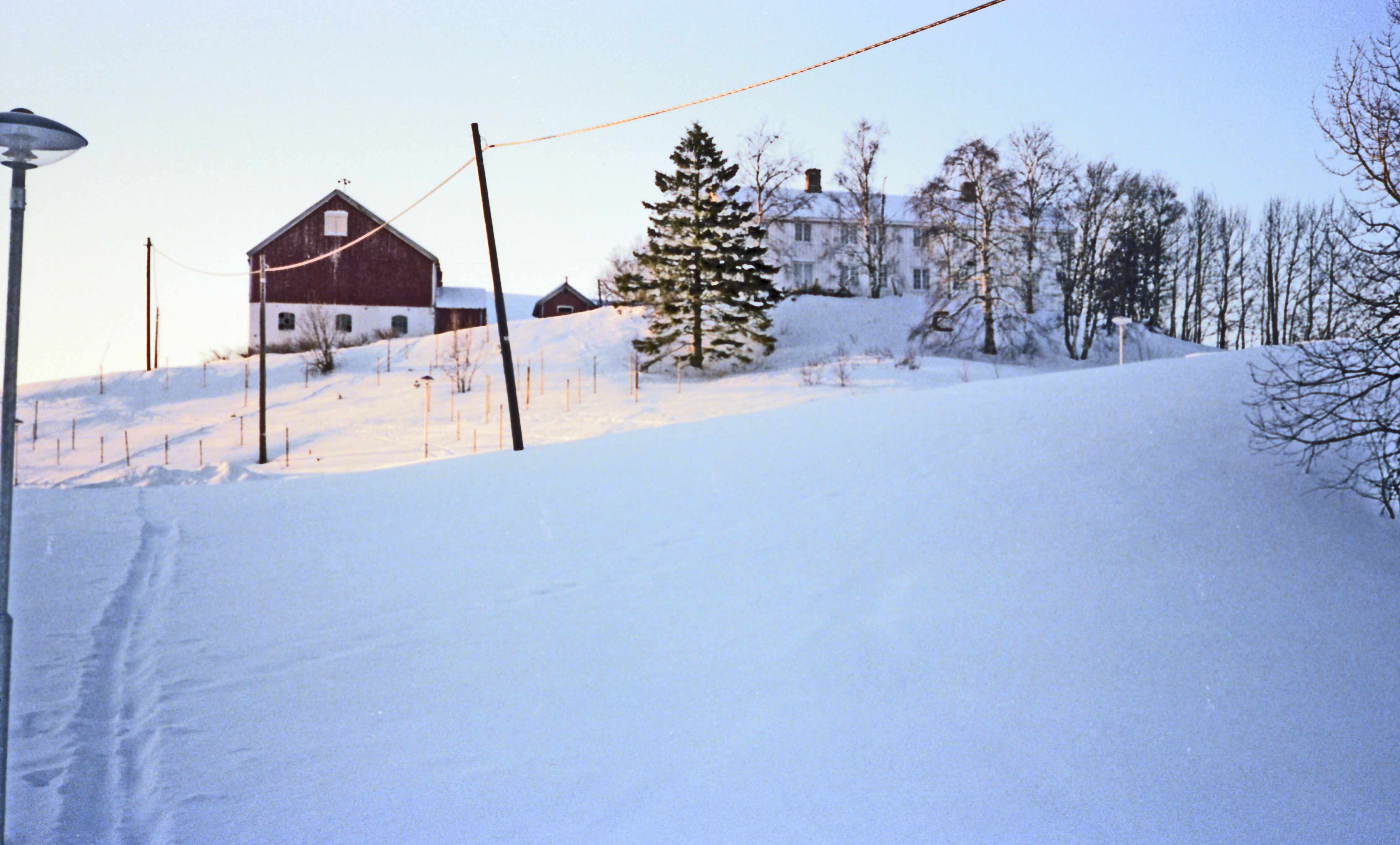 Format: 35 mm farge negativ Film: Kodak Safety Film, KodaColor II Dato / Date: Ukjent Fotograf / Photographer: Ukjent WikiStrinda: Dragvoll gård GIS/LINE: bit.ly/xT7WKh Google Maps: bit.ly/y3mR7D Street View: bit.ly/yBRjwe Eier / Owner Institution: Trondheim byarkiv, The Municipal Archives of Trondheim Arkivreferanse / Archive reference: Tor.H43.P1.F5444, film 22 Merknad: Fra Byantikvarens negativsamling. Tilhørte erkebiskopen og domkapitlet i middelalderen. 1647 delt mellom kronen og sognepresten i Vår Frue kirke. 1683 tilhørte den Casper Wildhagen, som la til ett av Loholtbrukene. Tilhørte deretter sogneprest Sebastian Withe i Vår Frue kirke, og fra 1736 generalveimester C. O. Lützow. 1739-67 og 1776-1835 tilhørte gården familien Ulfers, deretter salmaker M. Spechmann og fra 1880 slekten Grendahl. Staten overtok Dragvoll på slutten av 1960-tallet og brukte gården til utbygging av Universitetssenteret på Dragvoll. Hovedbygningen er bevart, men låven ble ødelagt av brann i 1981. En ny bygning med samme volum som låven er reist på tomten. [Kilde: Trondheim Byleksikon 2008] Dragvoll gård, Trondheim, Norway